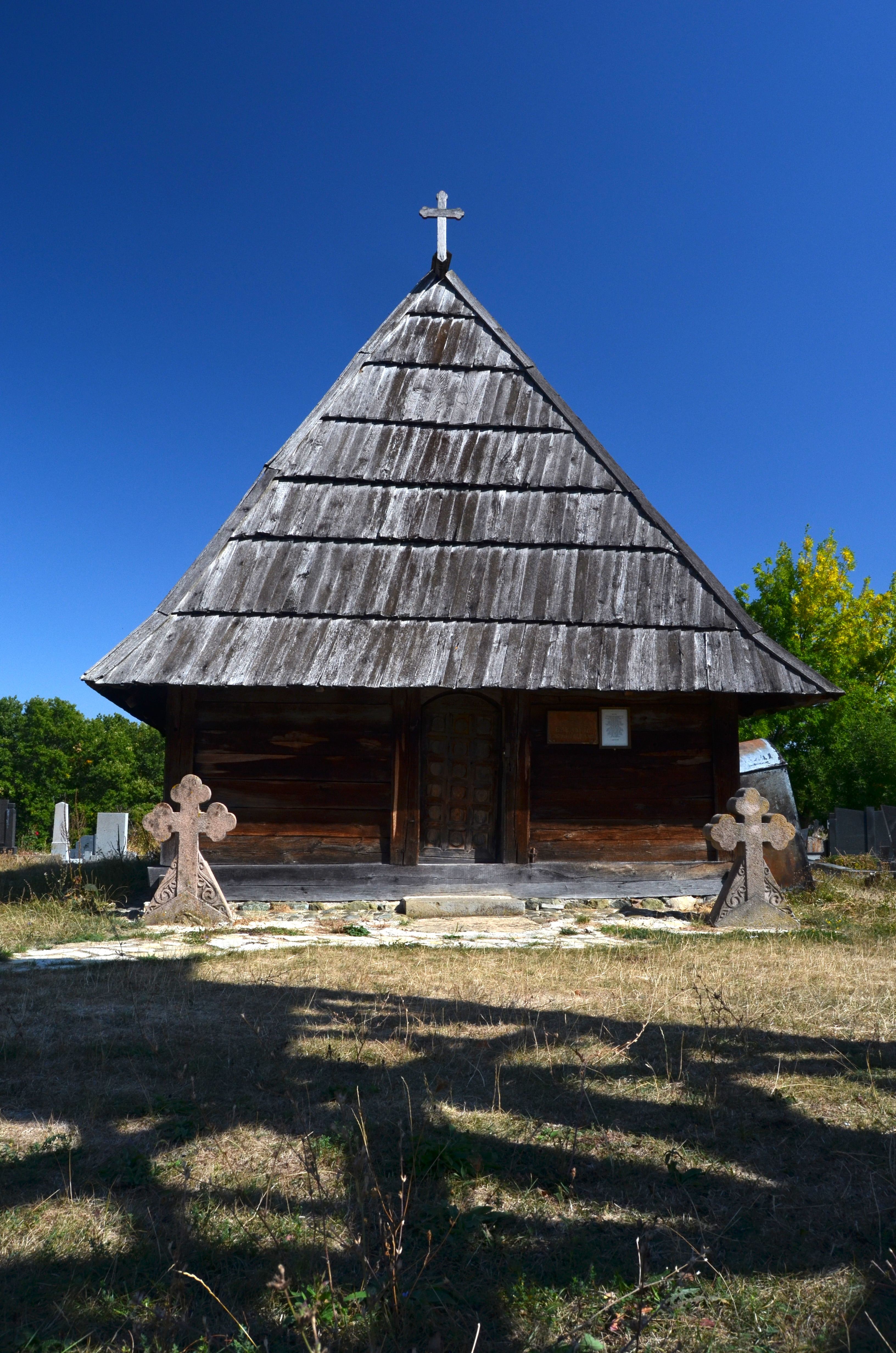 Снимак из 2012.